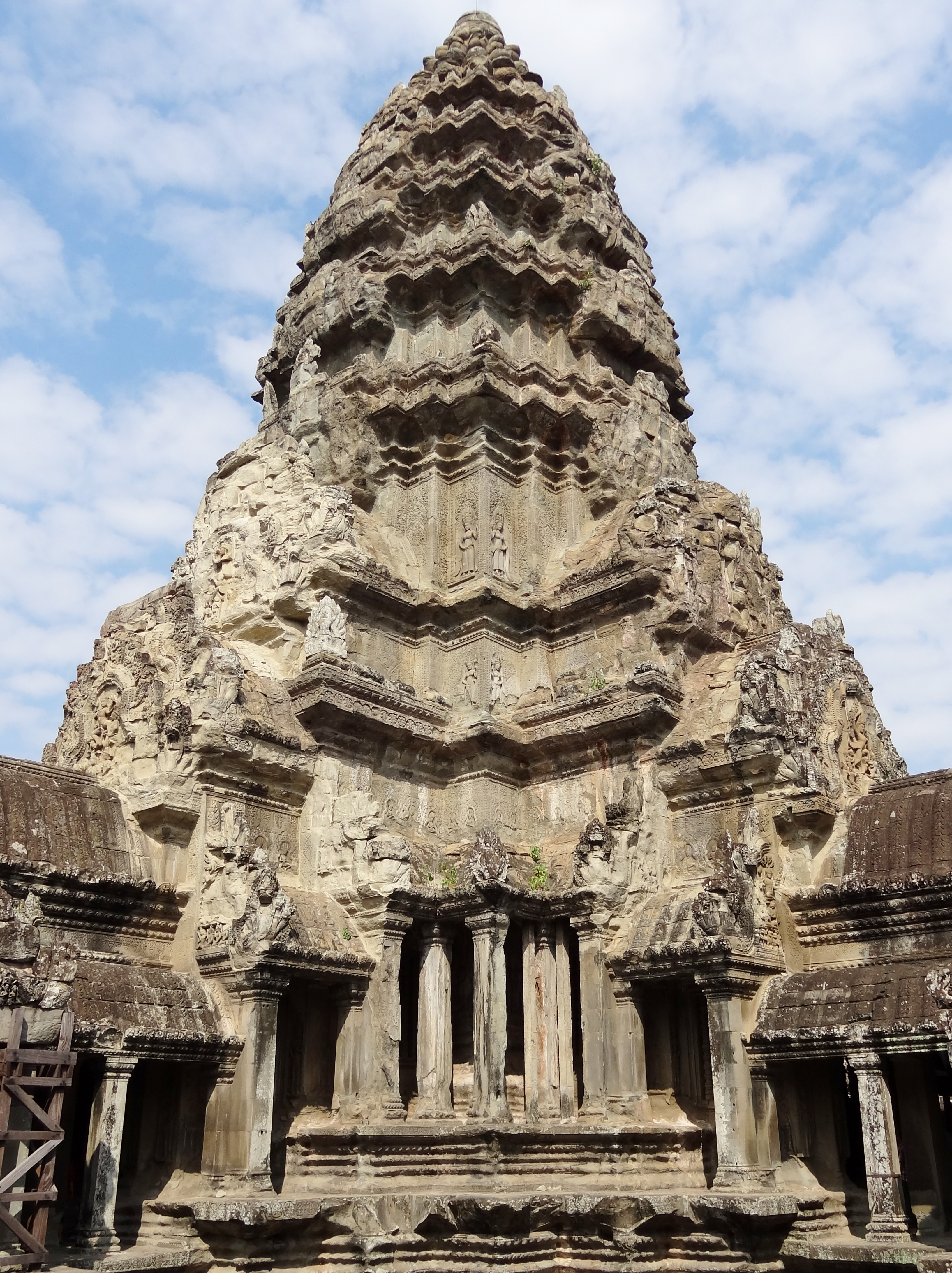 Zentraler Prasat auf der dritten Ebene des Tempels von Angkor Wat (អង្គរវត្ត ‚Tempelstadt‘), Provinz Siem Reap, Kambodscha